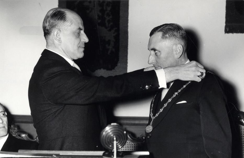 Höppener, R.G.A. ( KVP). Installatie van oud-staatssecretaris van Onderwijs Kunste en Wetenschappen mr. R.G.M. Höppener als burgemeester van Roermond. Loco-burgemeester mr. Rene van Boven hangt hem de ambtsketen om. Nederland, Roermond, 8 of 9 januari 196